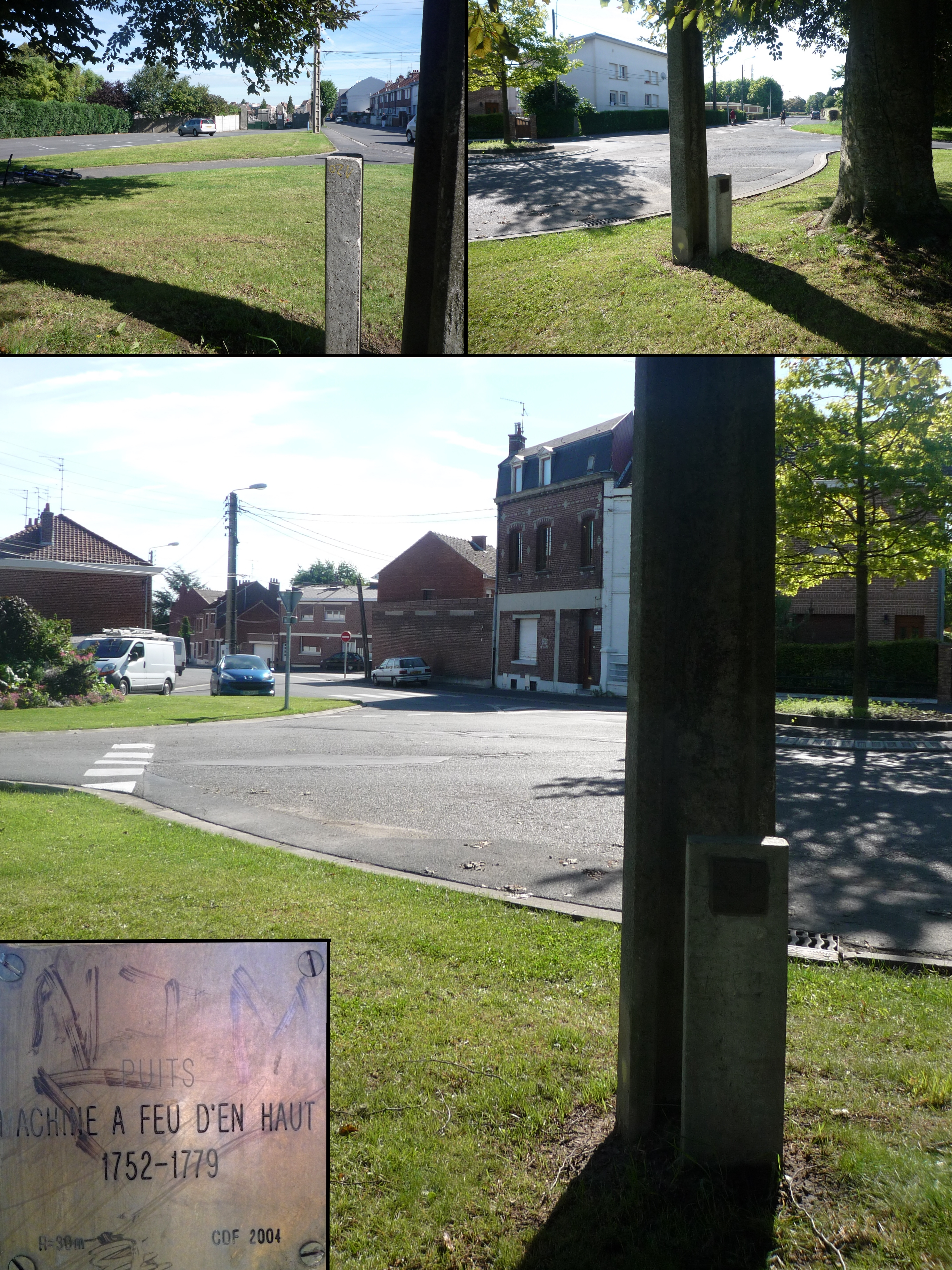 Puits Machine à feu d'en haut de la Compagnie des mines d'Anzin, Anzin, Nord, Nord-Pas-de-Calais, France.